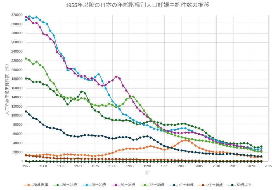 1955年以降の日本の年齢階級別人口妊娠中絶件数の推移